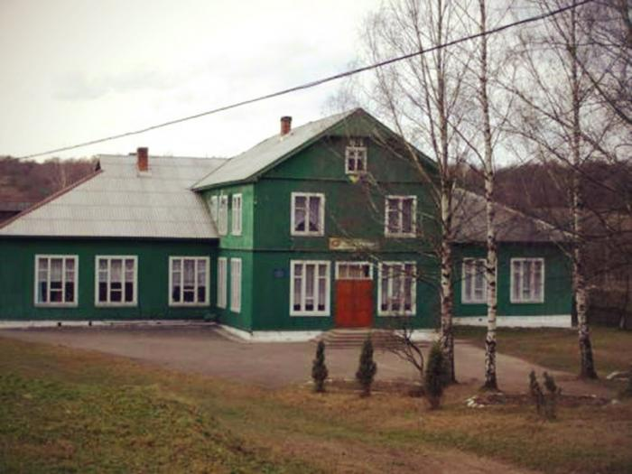 Завій